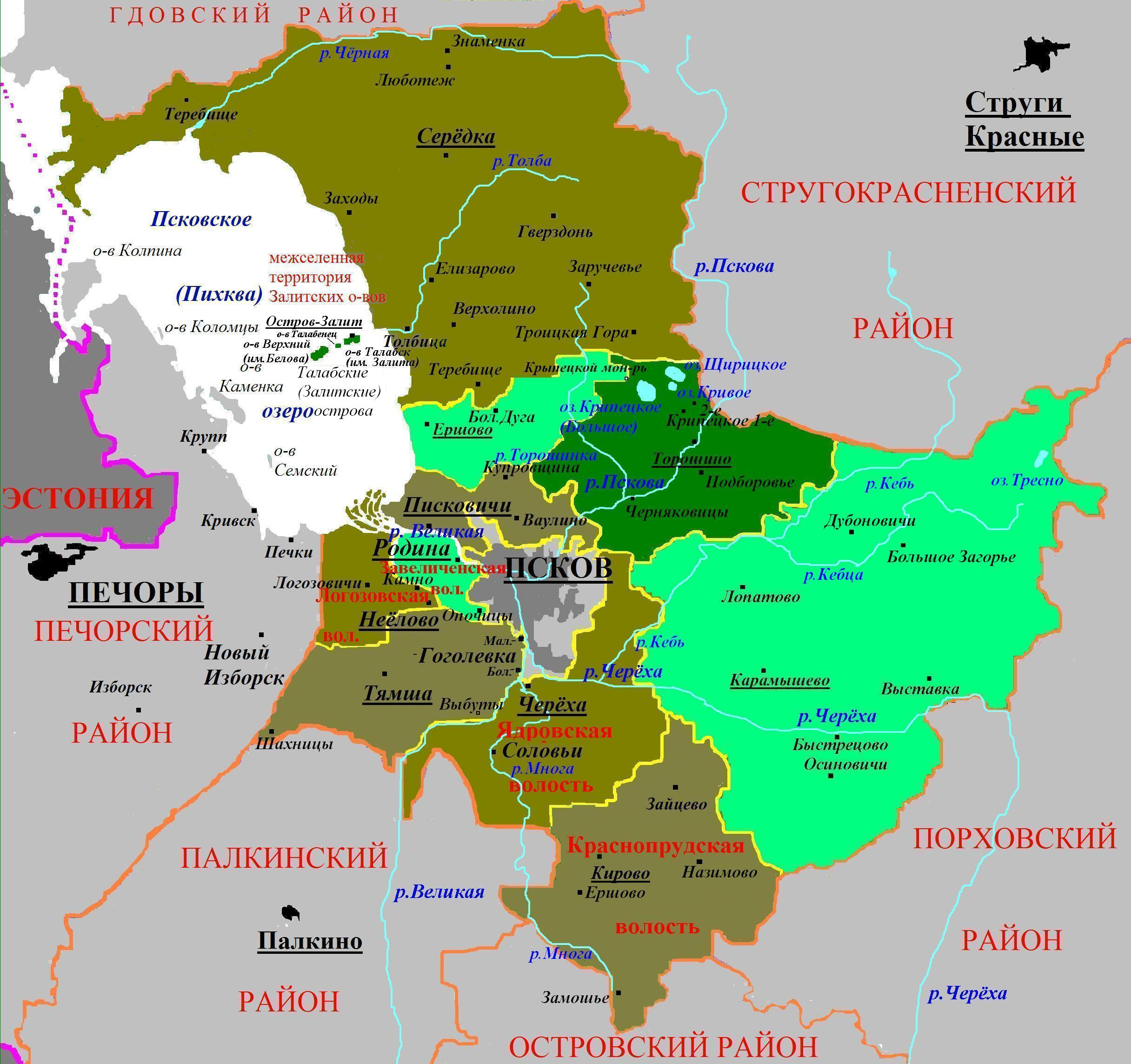 Административная карта Псковского района. С 1.01.2010